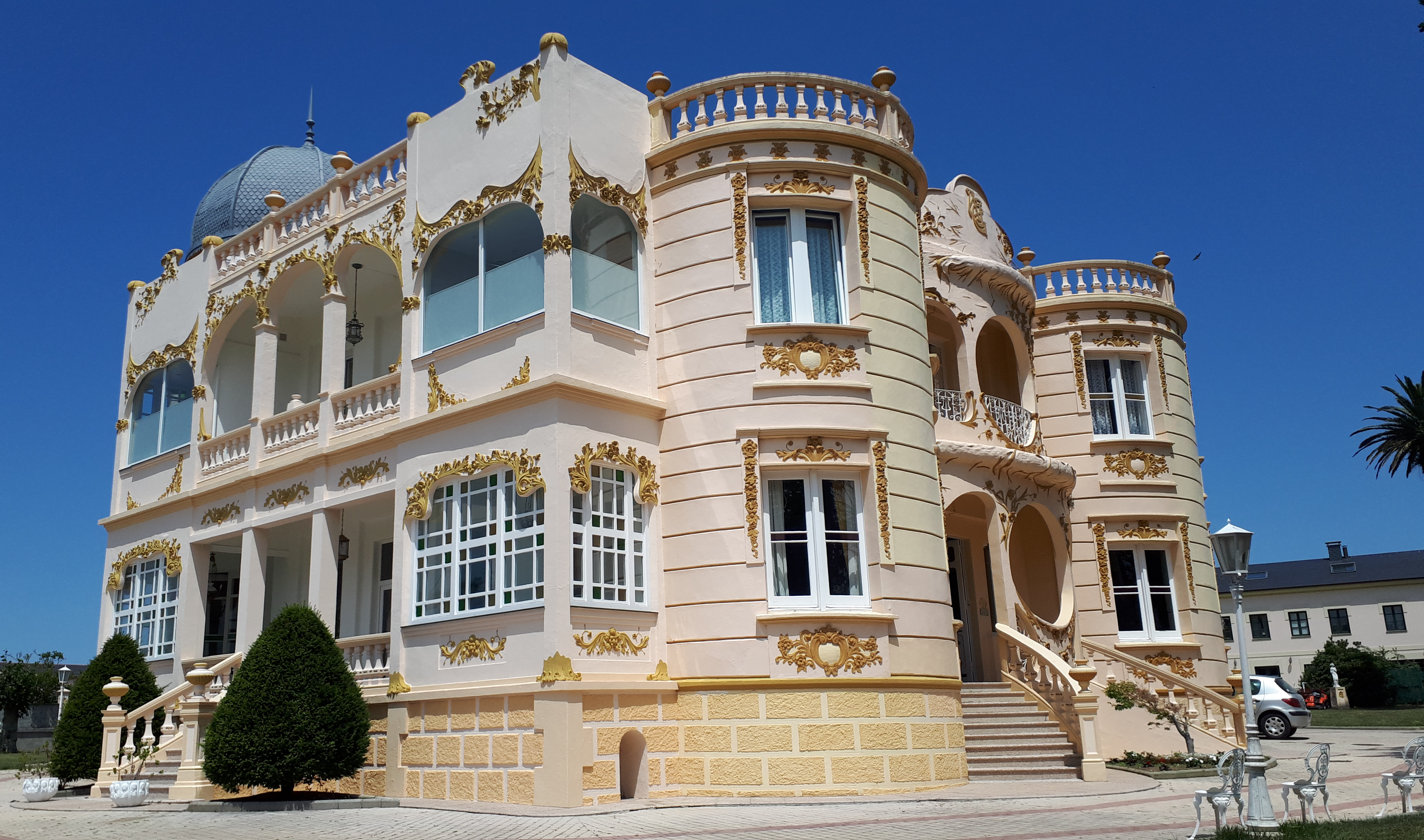 Palacete Peñalba en Figueras (Asturias - España). Conjunto de dos edificios modernistas diseñados por el arquitecto militar Ángel Arbéx (discípulo de Gaudí) ejemplo de la arquitectura indiana asturiana, con rasgos del art nouveau; rodeado por un jardín de 16.000 metros cuadrados. Mandados construir en 1912 por Socorro Granda Sánchez, viuda de Wenceslao García Bustelo. Actualmente es un hotel de lujo.